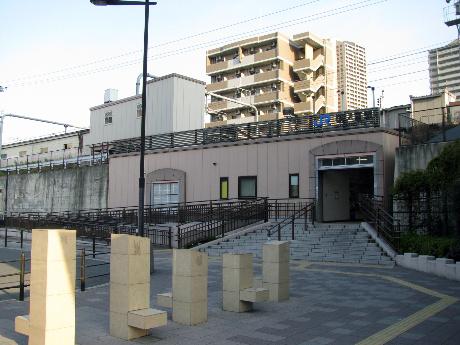 JR大阪環状線桜ノ宮駅